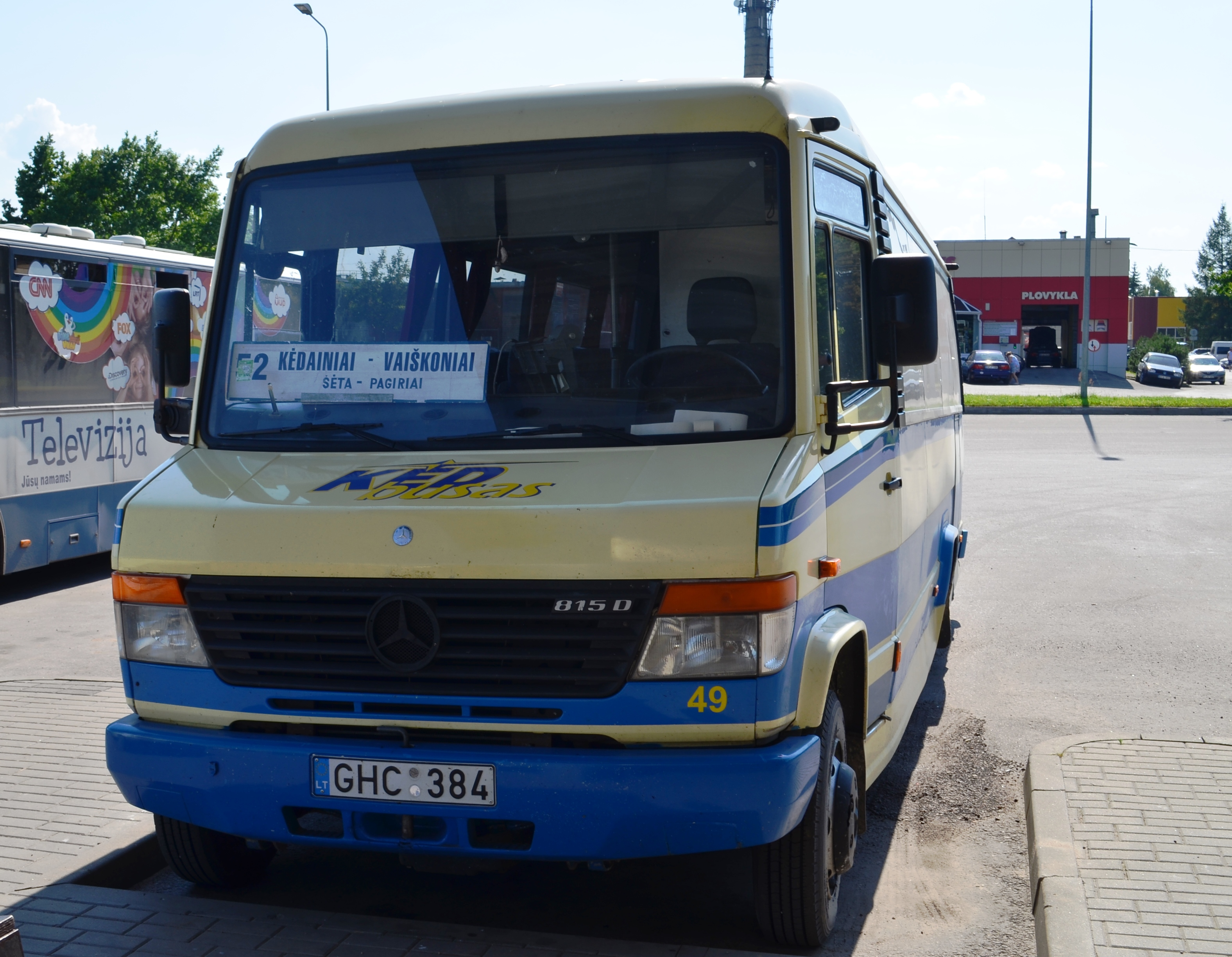 "Kėdbuso" mikroautobusas Mercedes, Kėdainių autobusų stotis